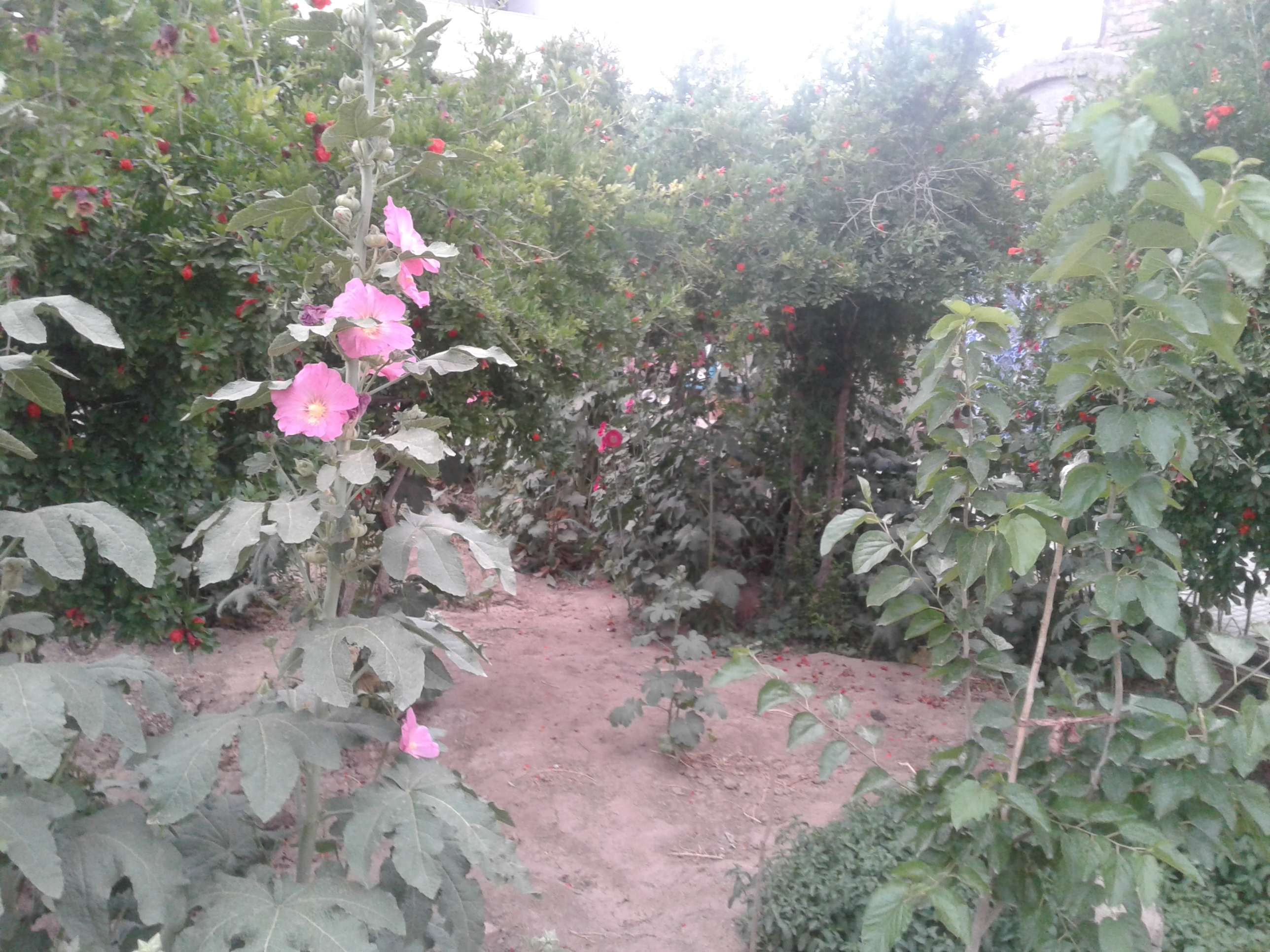 شهر جنگل